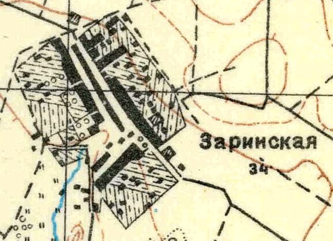 Топографическая карта Ленинградской области, квадрат О-35-11-В-в (Копорье), деревня Заринское